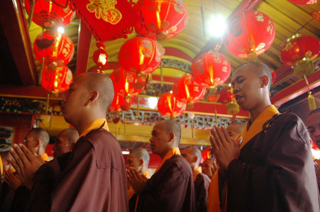 Monks pray before Vessak Day 2010 in Magelang, Central Java, Indonesia (May, 26, 2010)